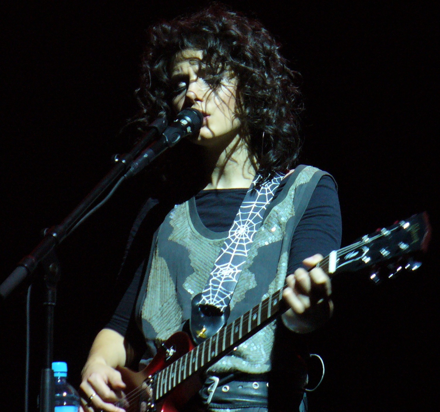 Katie Melua in Milan